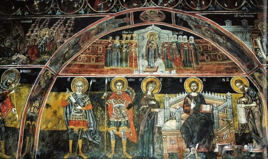 Фреска во манастирската црква Св. Никола во прилепско Слепче